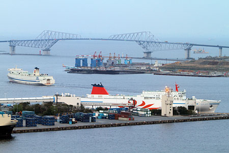 テレコムセンター展望台から眺めた東京ゲートブリッジ。東日本大震災の津波により大洗港が使えなくなり、代替で東京港に入港した商船三井フェリー「さんふらわぁ だいせつ」と出航していくオーシャン東九フェリー(2011年4月24日)